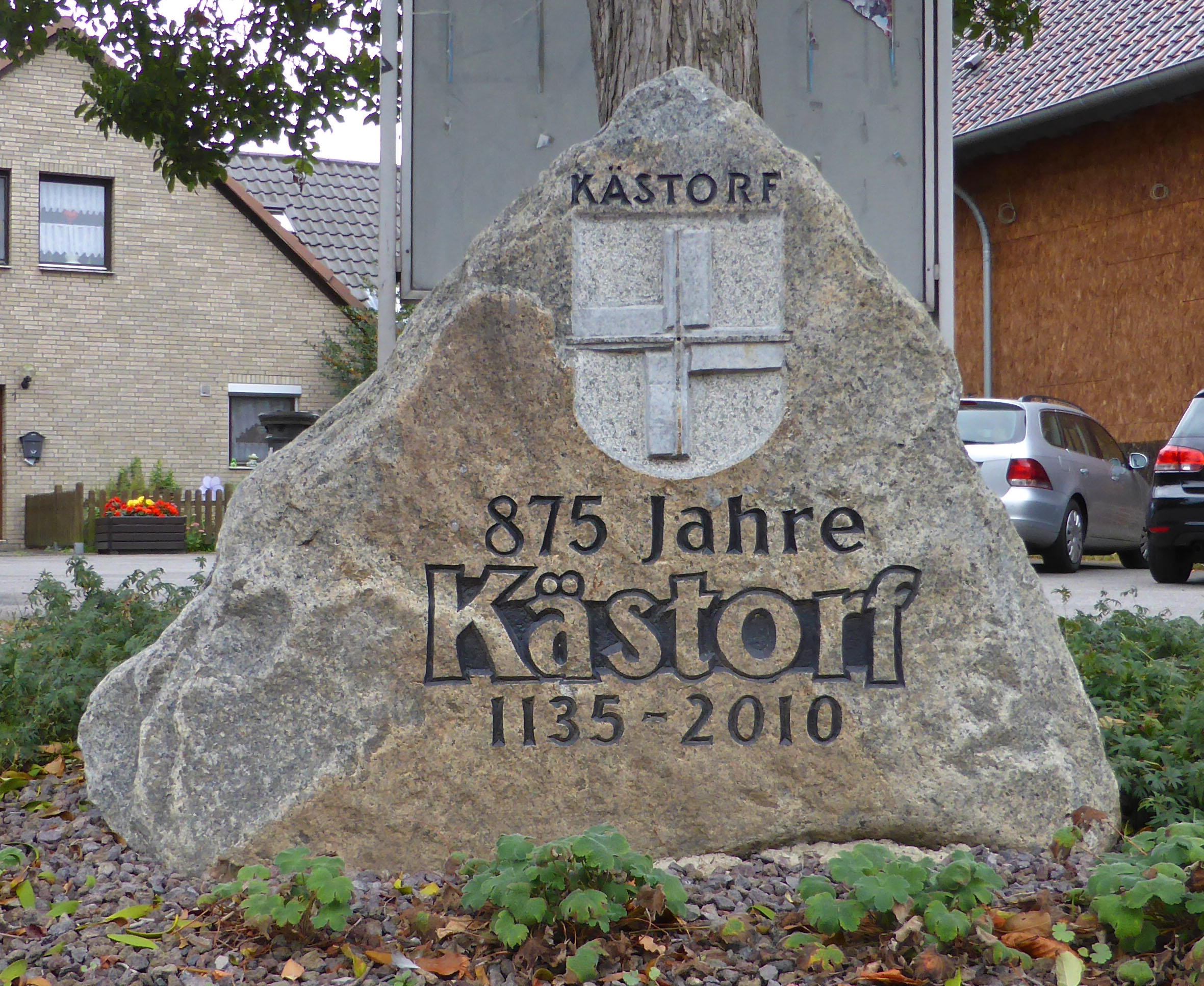 Gedenkstein in Kästorf, Ortsteil von Wolfsburg.